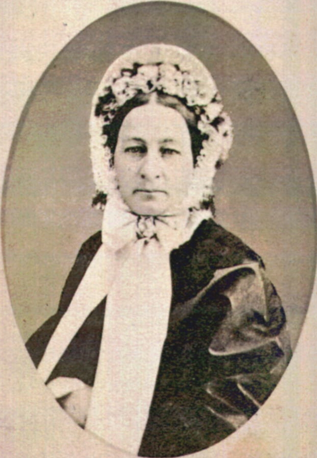 Veronika Wischin (Familienname auch: Visin, + 1884), Ehefrau von Eduard Pleschner